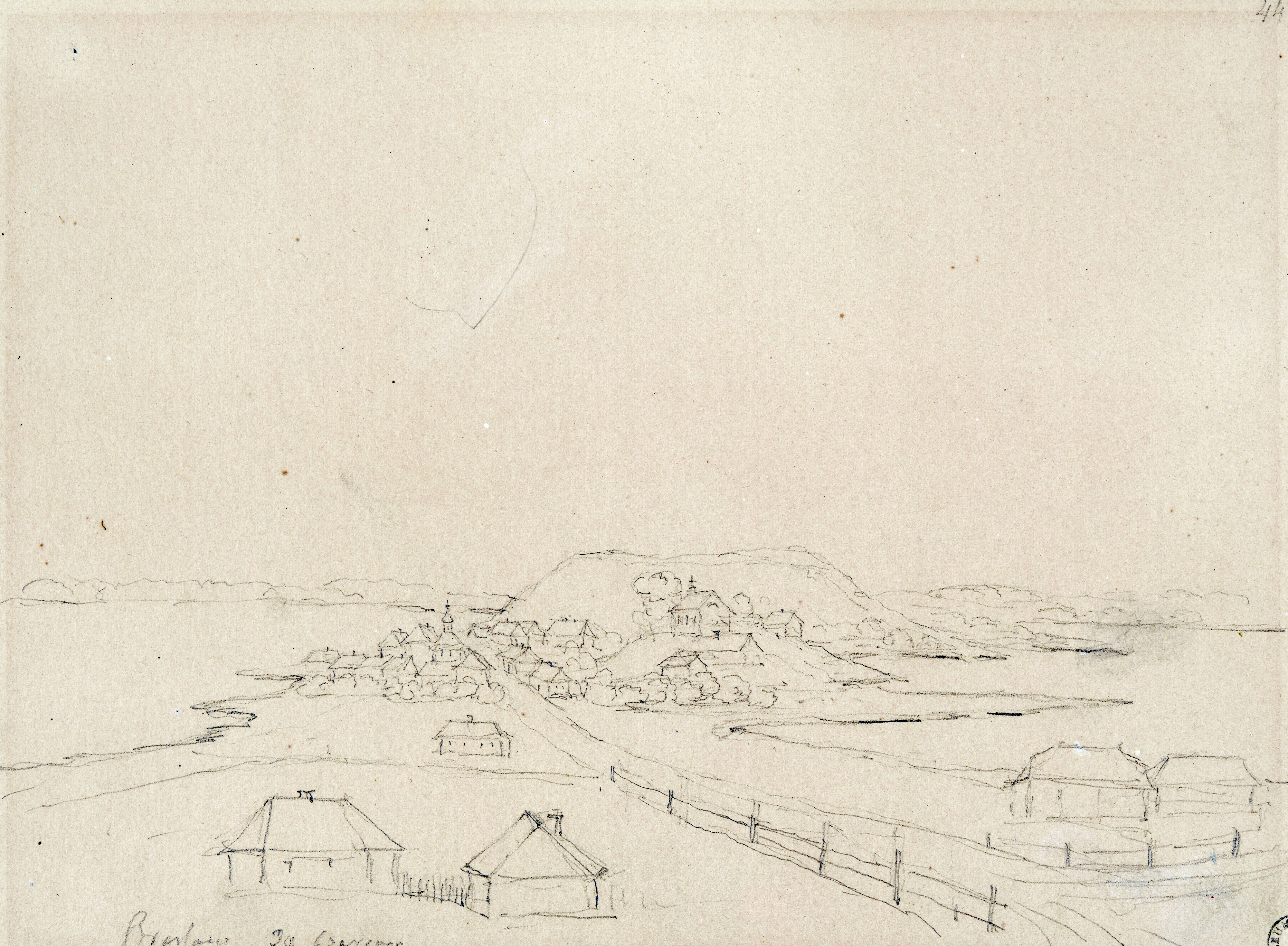 Беларуская (тарашкевіца): Браслаў (Brasłaŭ)